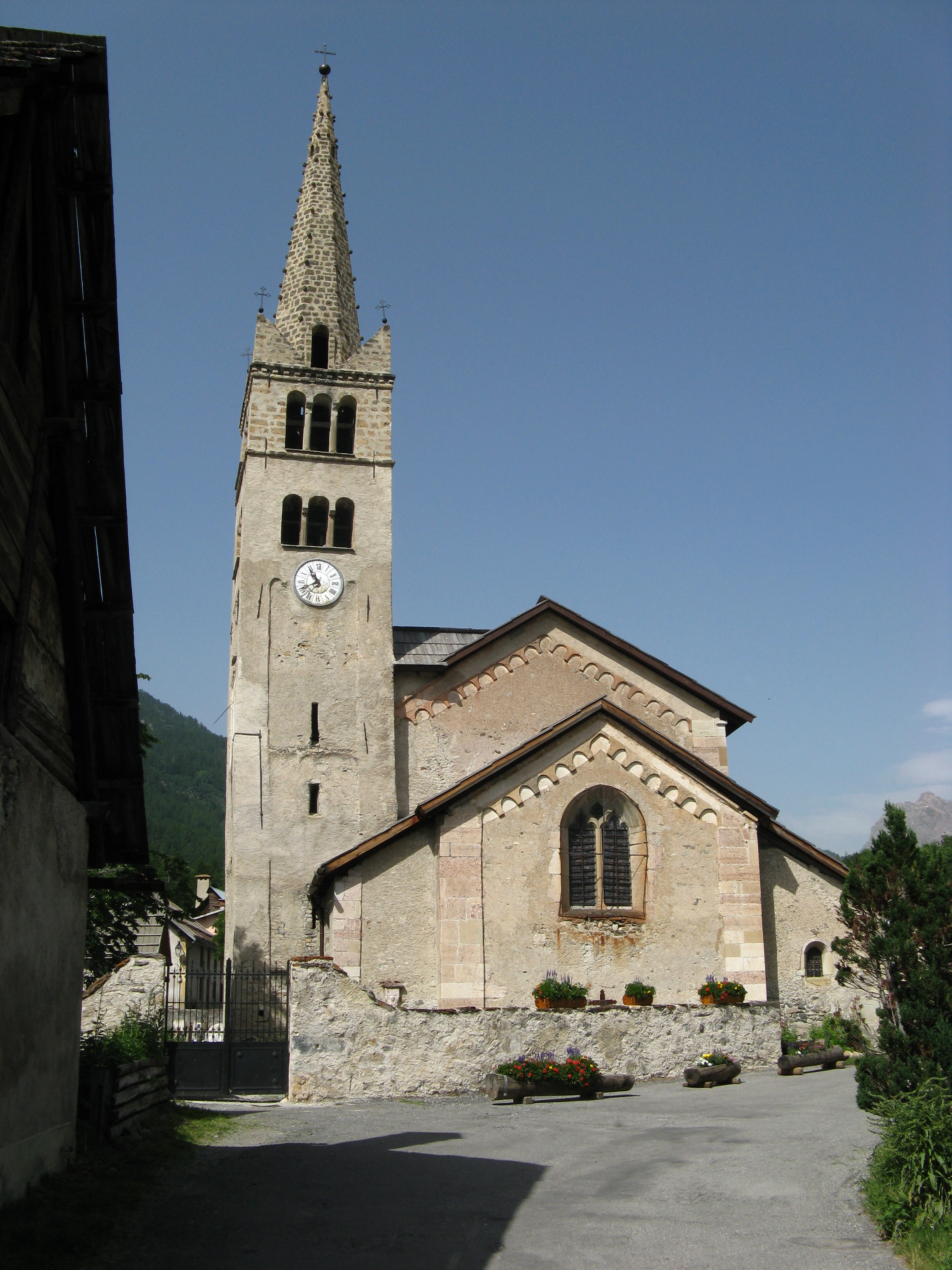 Eglise de Névaches